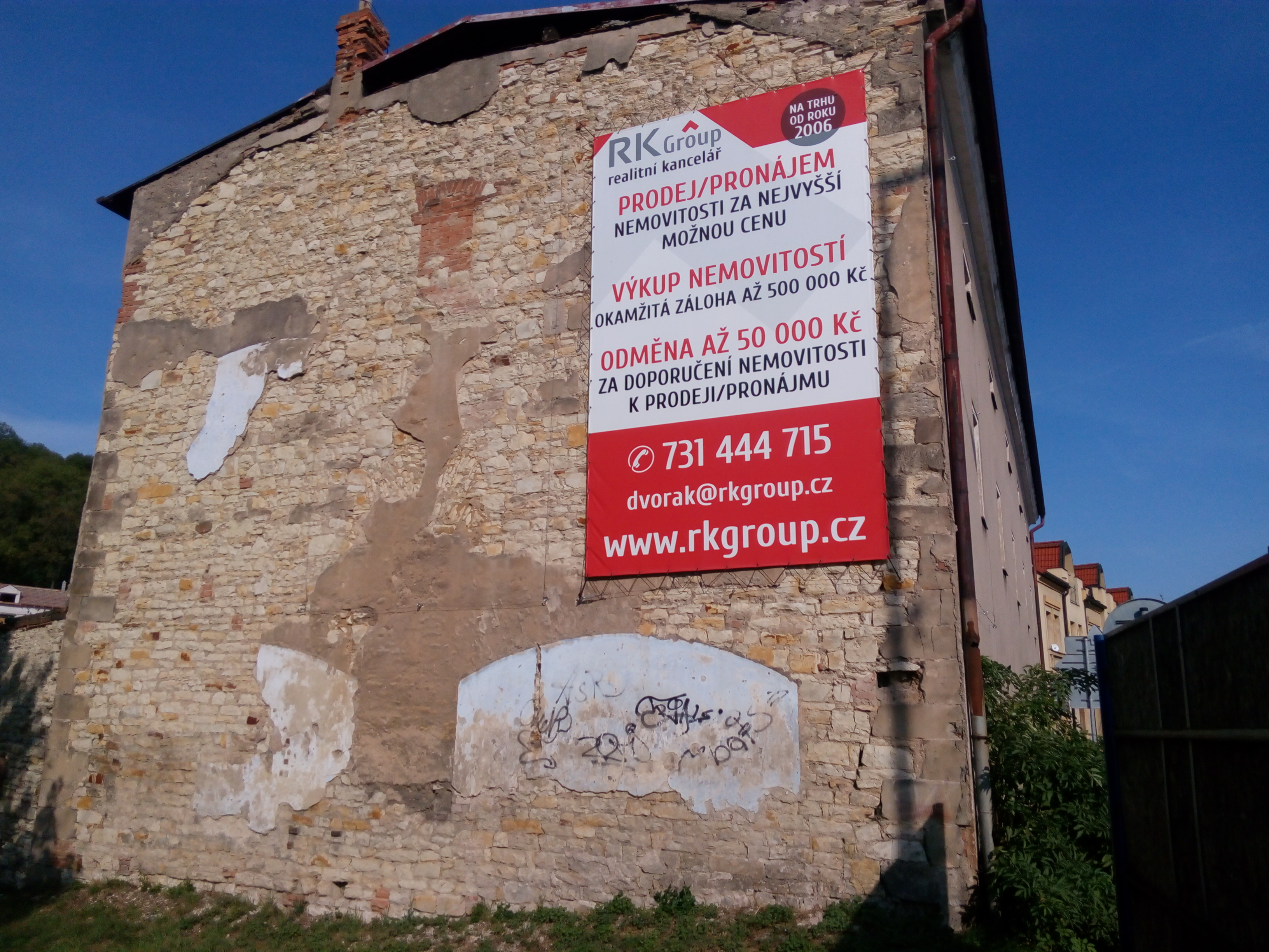 Kostel svatého Vavřince